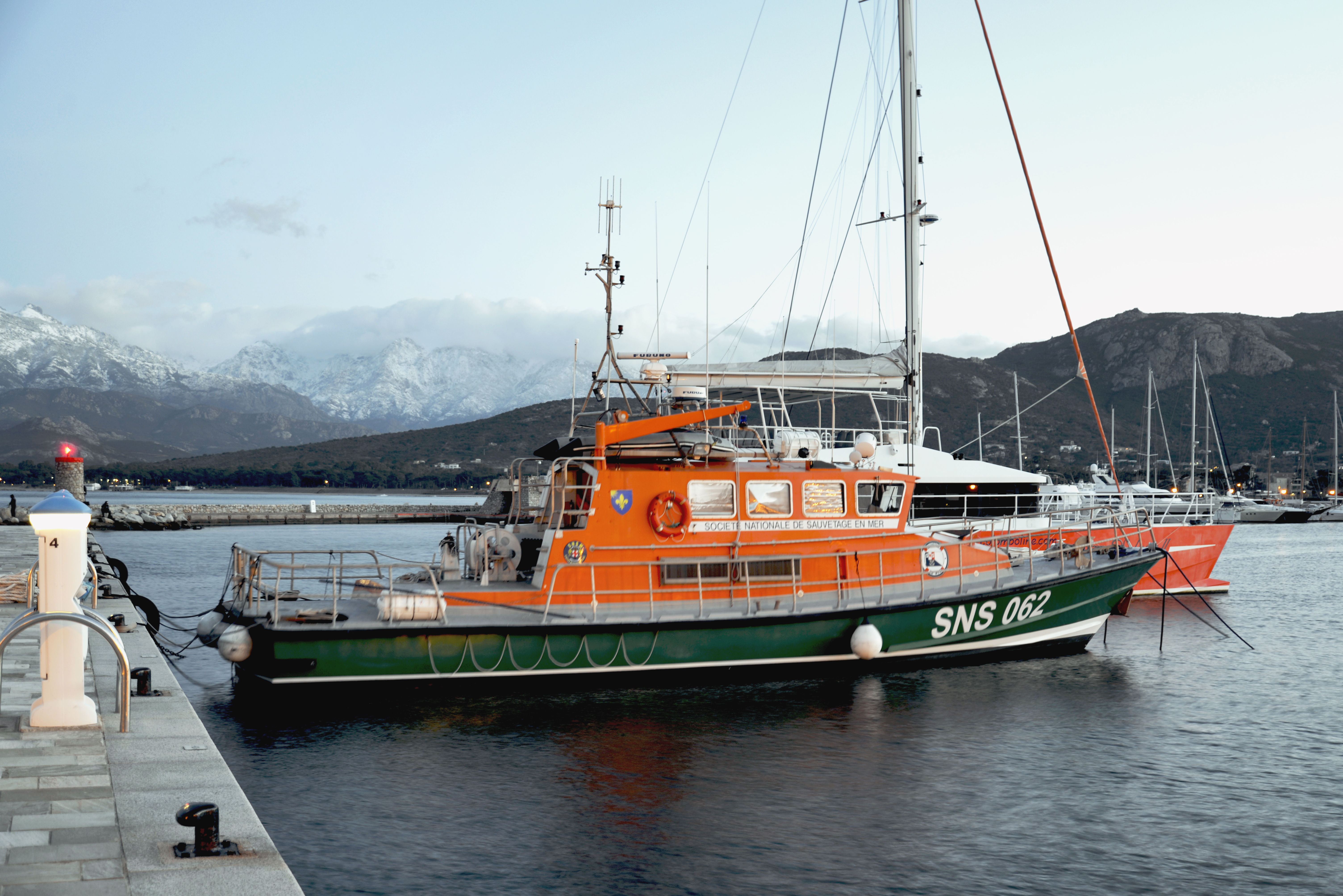 Calvi, Balagne (Corse) - "Marius Olivieri", la nouvelle vedette de sauvetage SNS 062 (en remplacement de la SNS 128 baptisée Notre-Dame de La Serra)